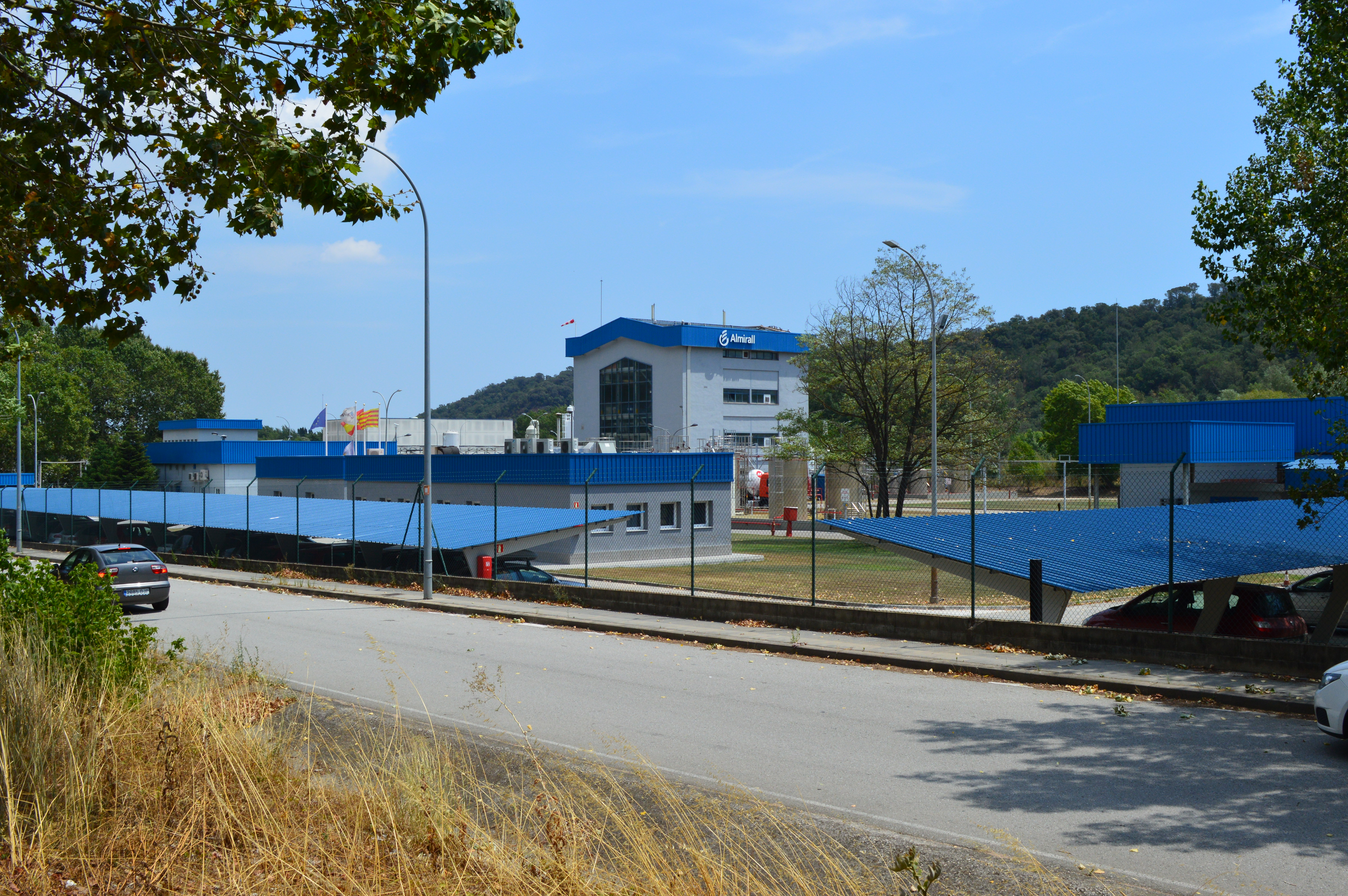 L’empresa farmacèutica Almirall, amb planta química a Sant Celoni (Ranke Química, SL).